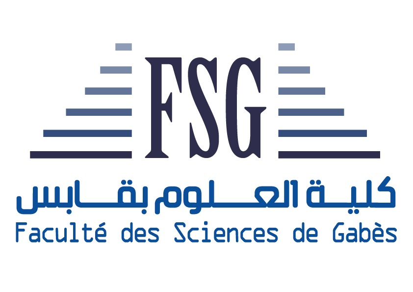 Logo de la Faculté des sciences de Gabès